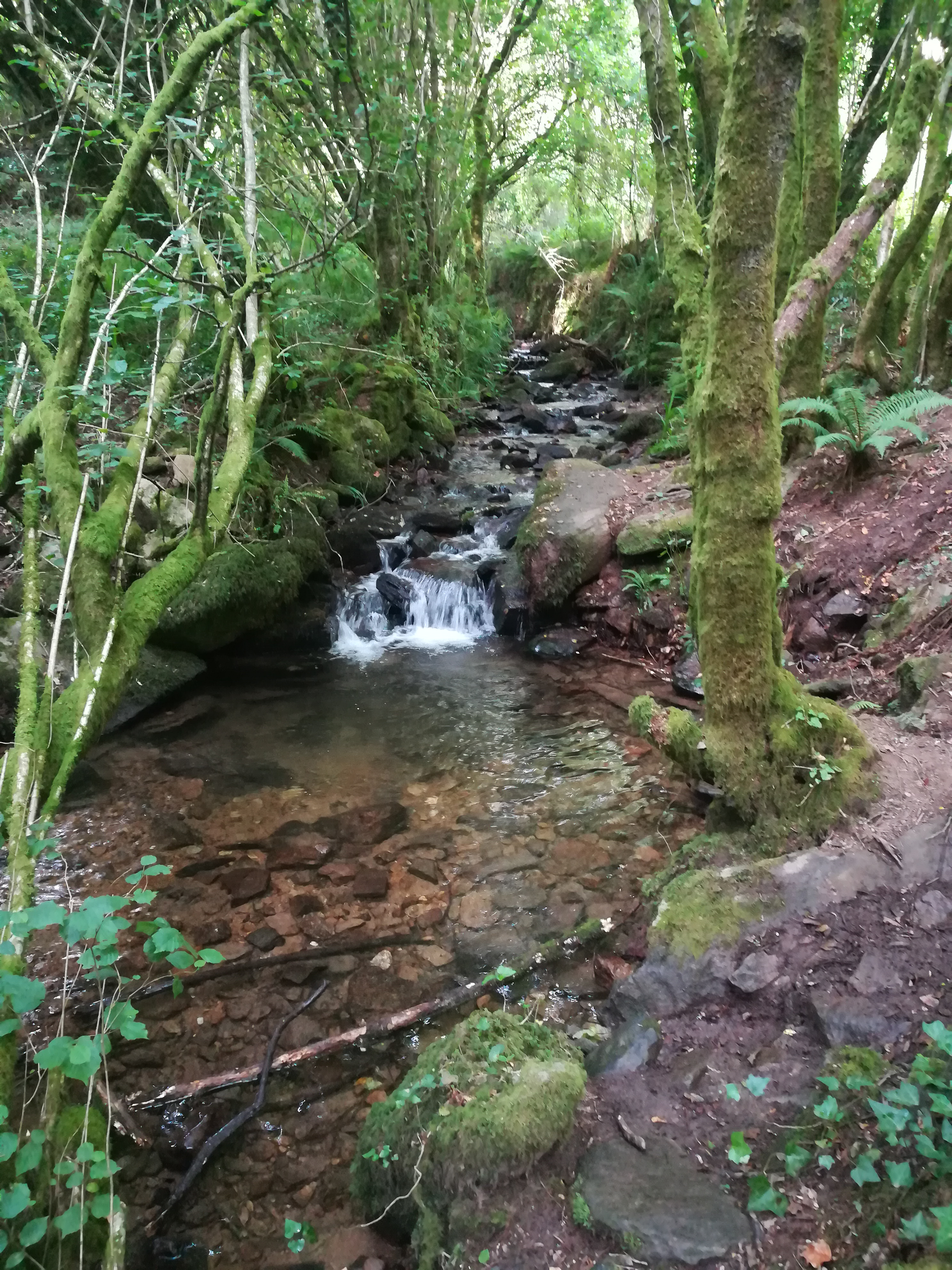 Río Eifonso (Bembrive, Vigo).